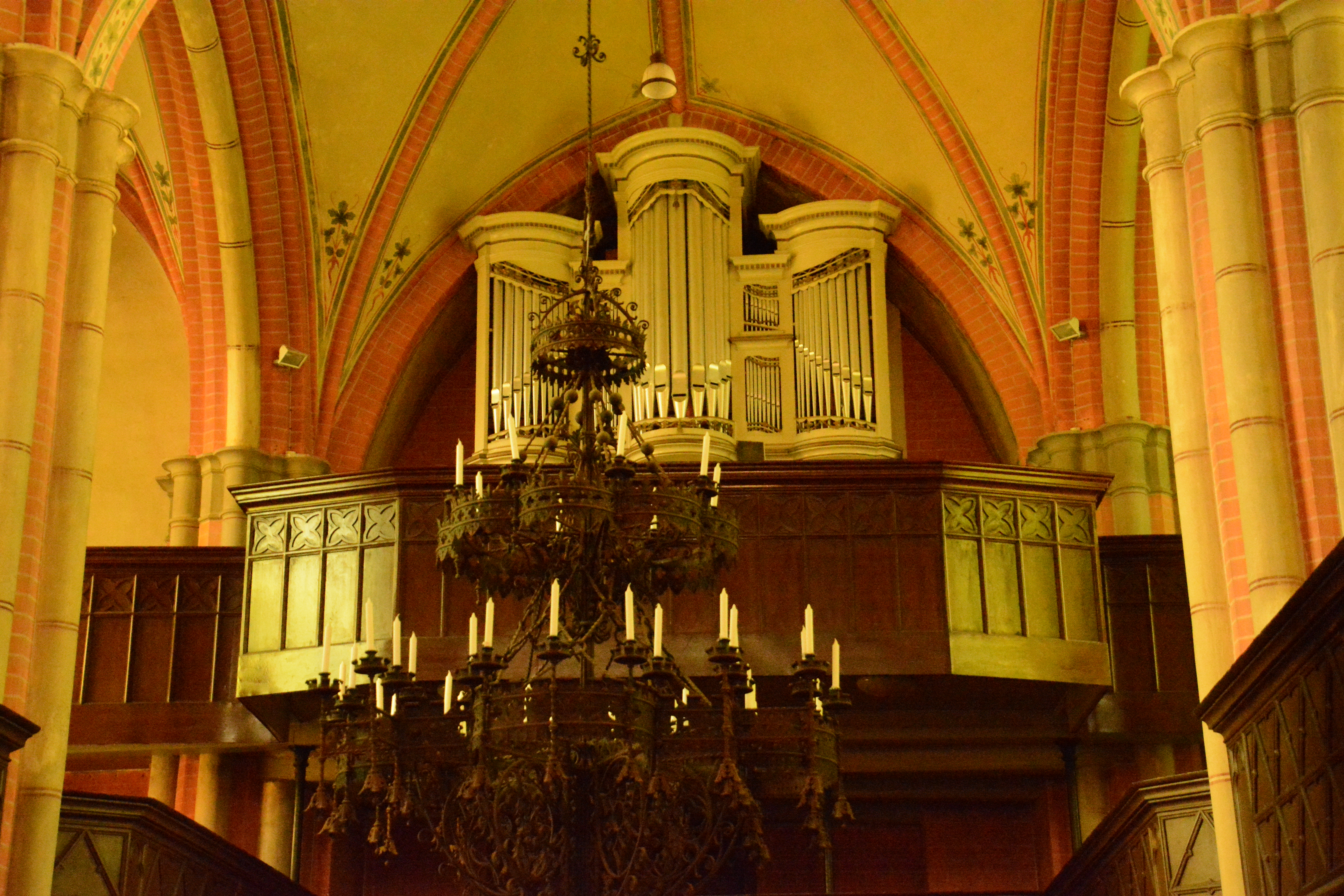 Stadtkirche Laage Orgelprospekt 3